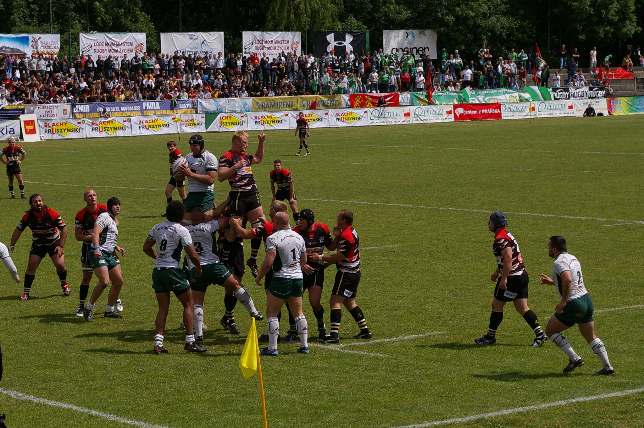 Finałowy mecz ekstraligi rugby sezonu 2009/2010 pomiędzy Budowlanymi Łódź a Lechią Gdańsk, aut Personality rights warning Although this work is freely licensed or in the public domain, the person(s) shown may have rights that legally restrict certain re-uses unless those depicted consent to such uses. In these cases, a model release or other evidence of consent could protect you from infringement claims.